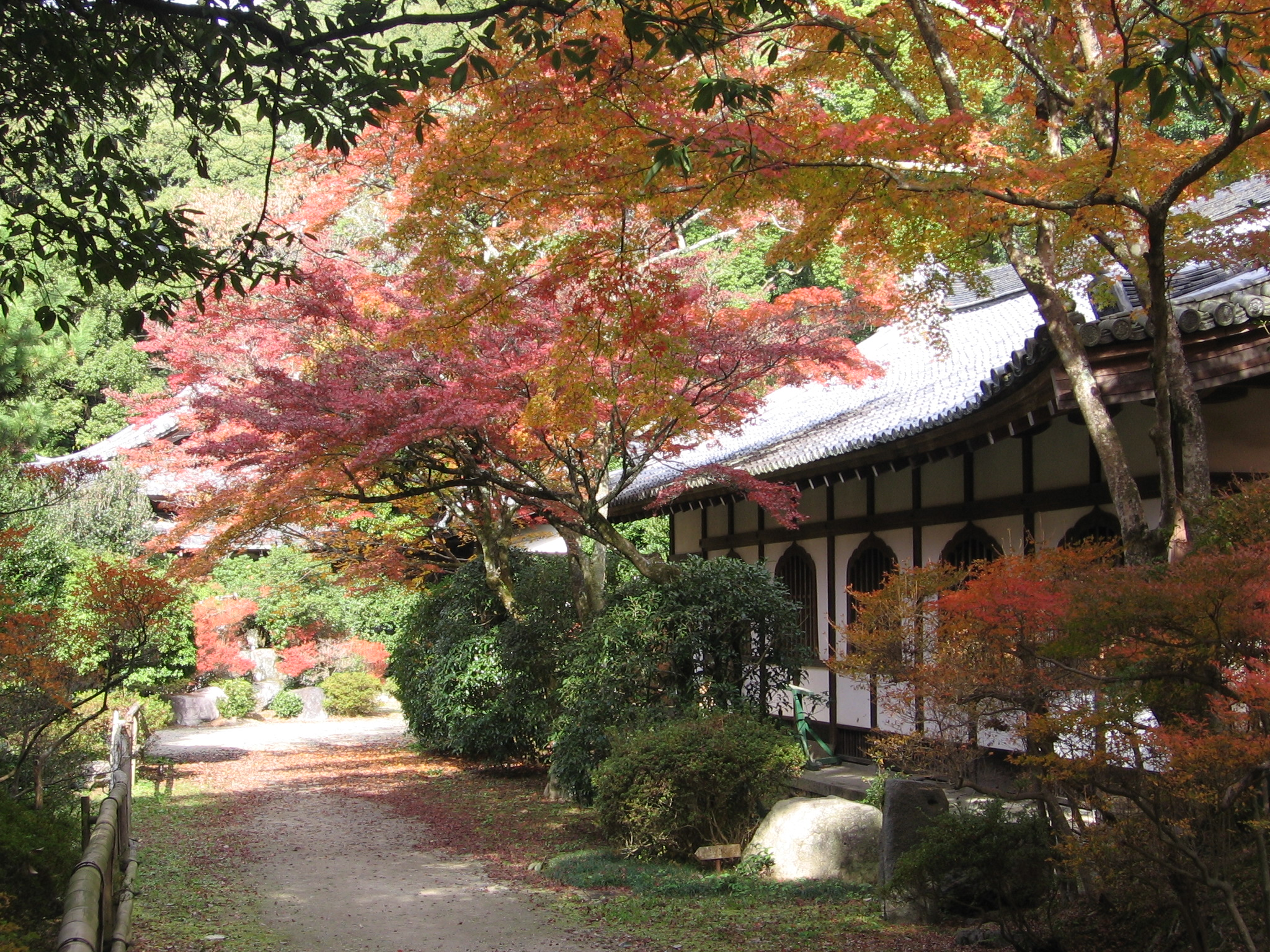 Photo de momiji (couleurs d'automne) prise au temple de Daigoji (Kyoto), le 20/11/2005.